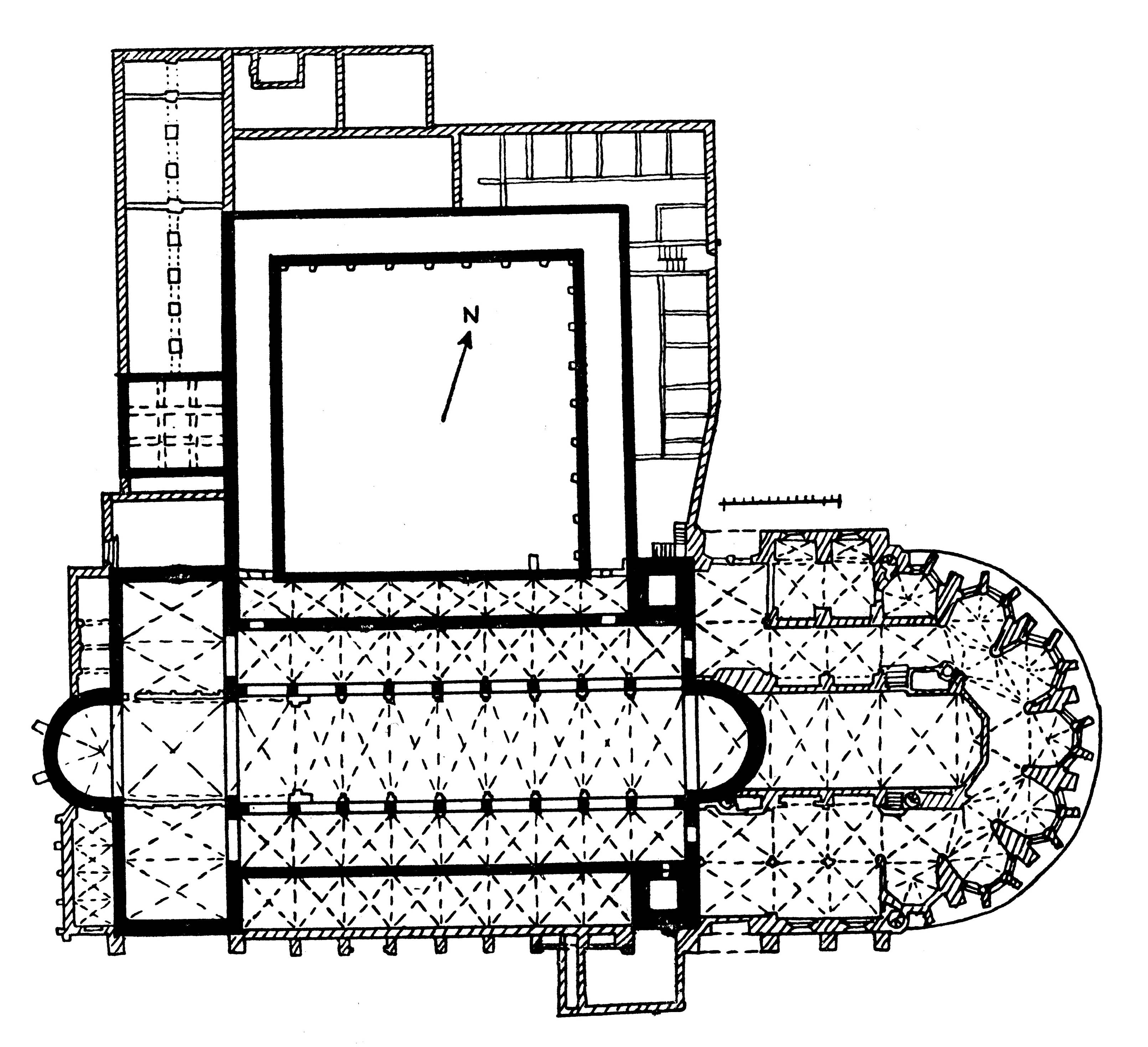 Grundriss Dom St. Maria